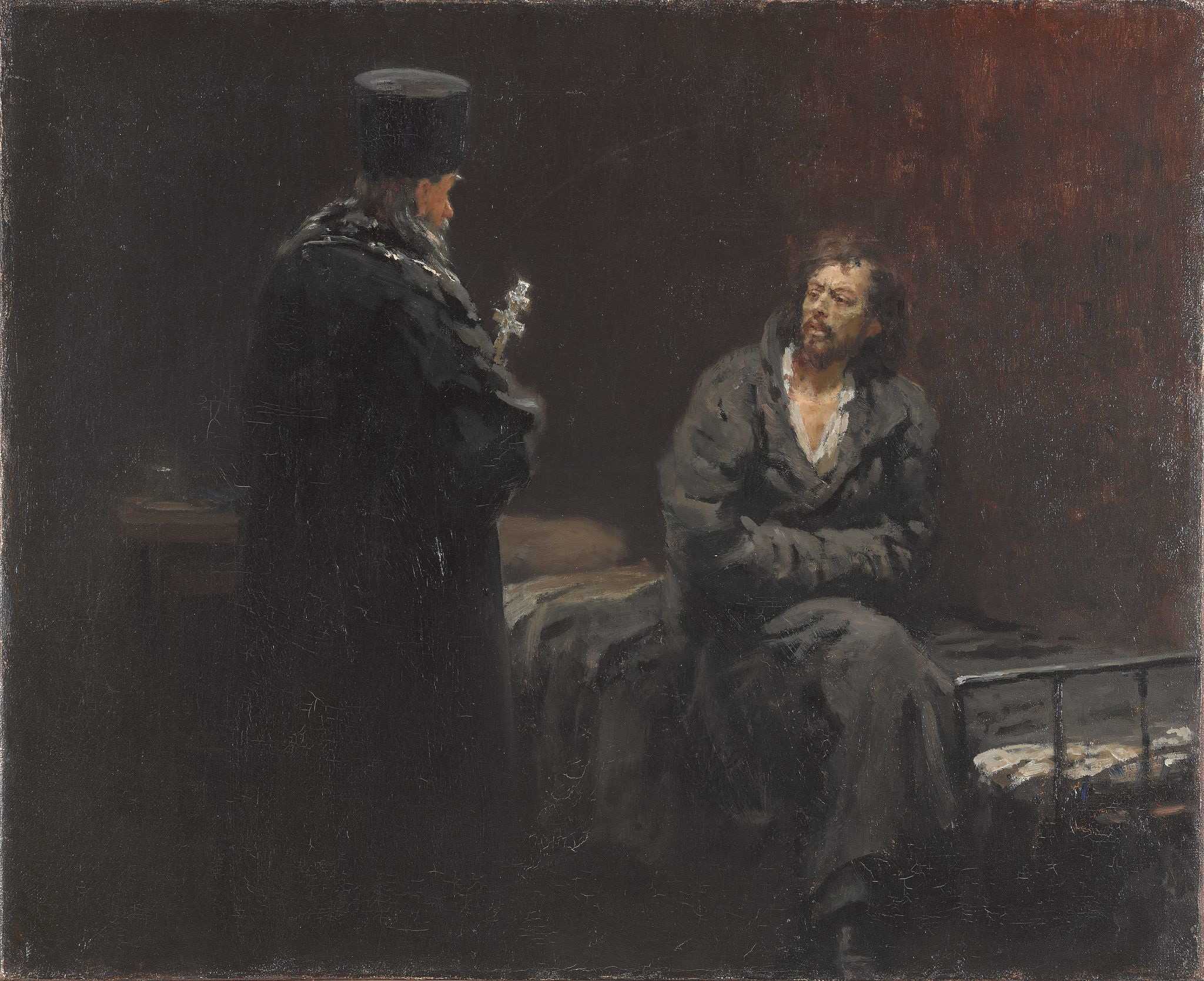 С 1936 г. именовалась "Отказ от исповеди", ныне экспонируется под оригинальным названием.